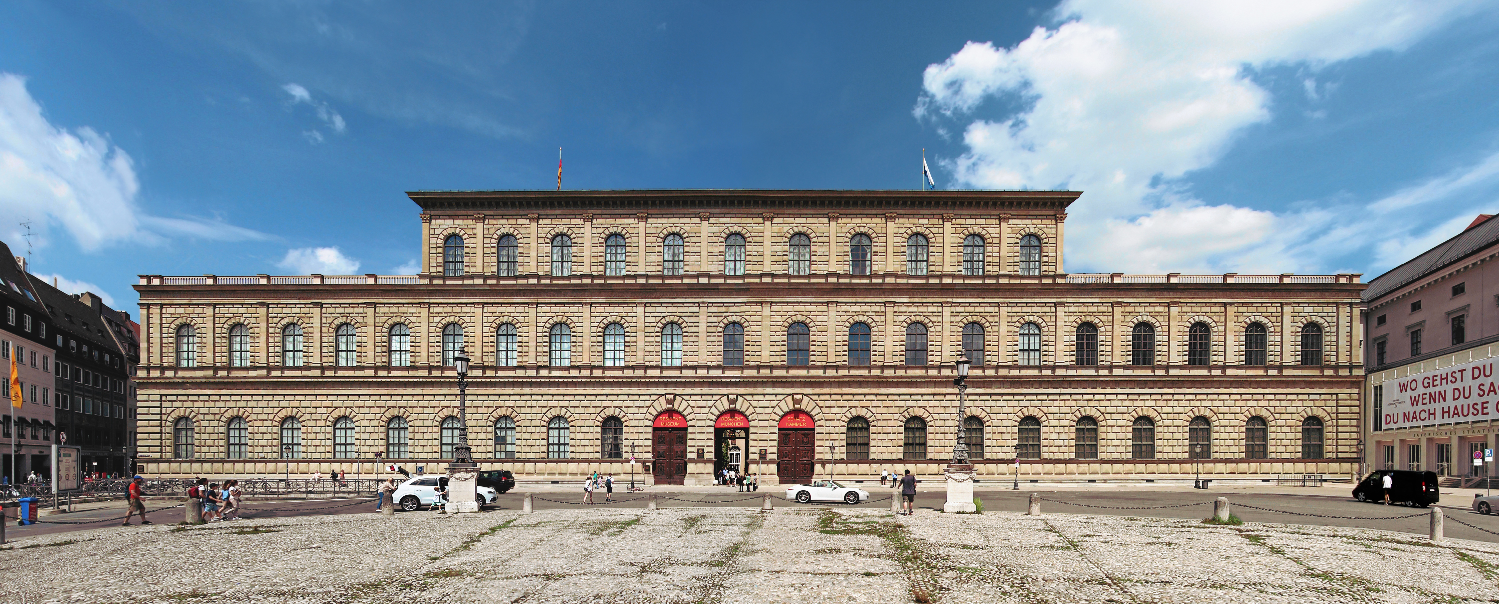 Münchner Residenz Ecke Theatinerstraße / Max-Joseph-Platz 2014